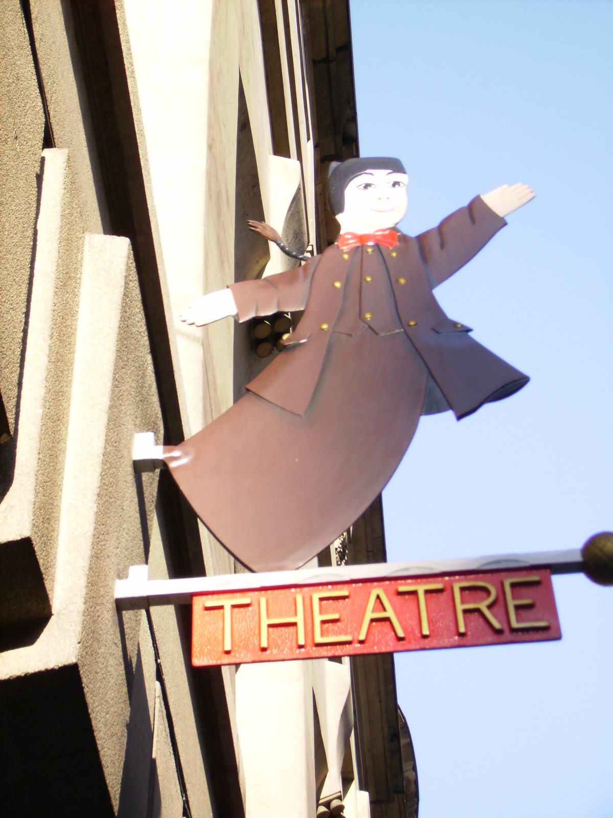 Enseigne Théatre Guignol Vieux Lyon - Lyon 5e